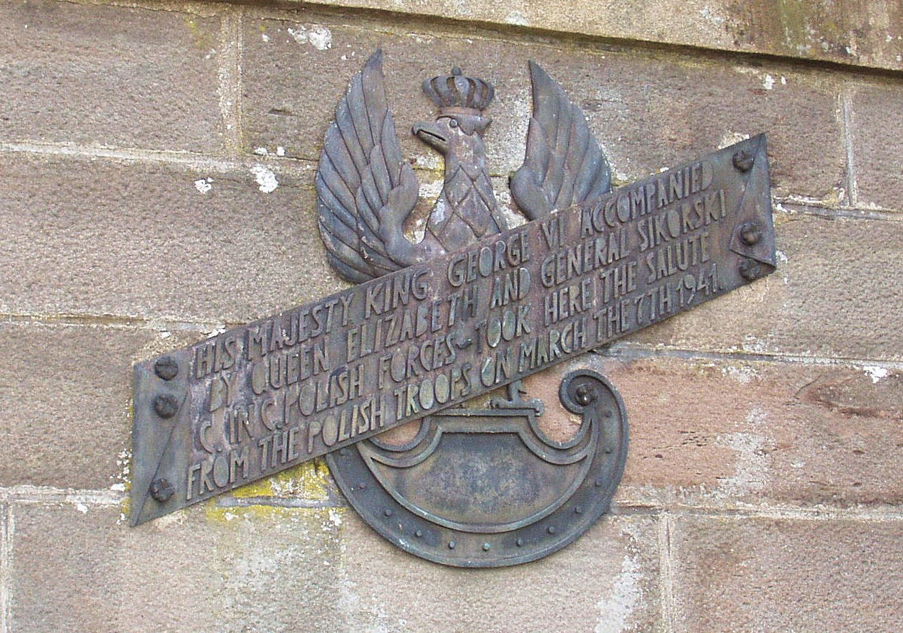 Forfar.Tablica pamiątkowa ufundowana przez radę miasta w pierwszą rocznicę wizyty pary królewskiej i przeglądu stacjonujących tam(i w okolicach) oddziałów polskich(ówczesna 10 Brygada Kawalerii Pancernej).